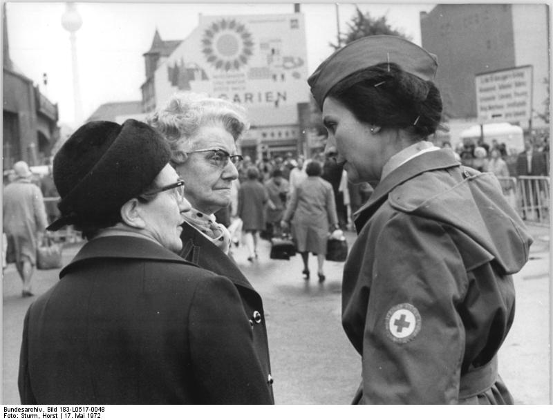 ADN-ZB Sturm-17.5.72-Berlin: Zeitweilige Regelungen erneut in Kraft getreten- an allen Grenzübergangsstellen Abfertigung zügig und reibungslos- DRK-Helfer standen wie hier am S-Bahnhof Friedrchsstraße mit Rat und Tat für die Besucher bereit. Seit den frühen Morgenstunden des 17.5.72 verläuft der Besucherverkehr für Bürger aus der BRD und Westberlin, die in die DDR und deren Hauptstadt einreisen, zügig und reibungslos.Korrekt und schnell erden die Besucher abgefertigt.